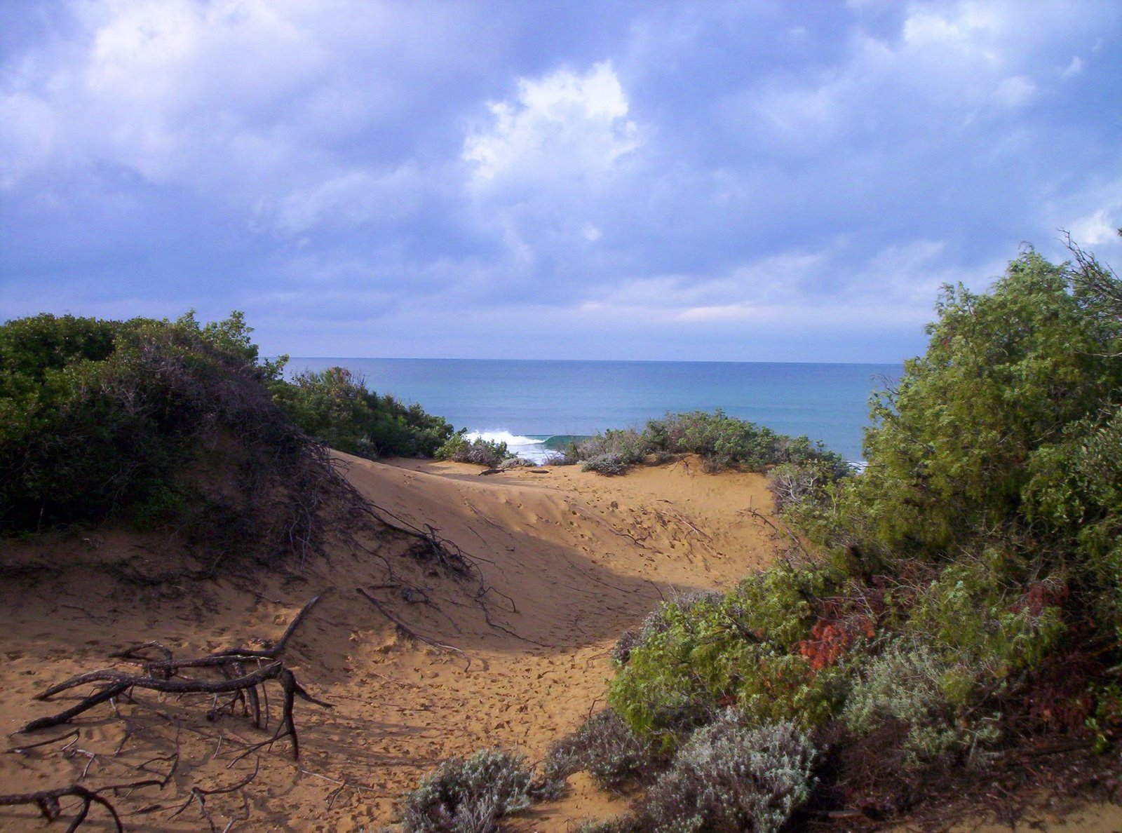 Fotografia del Parco